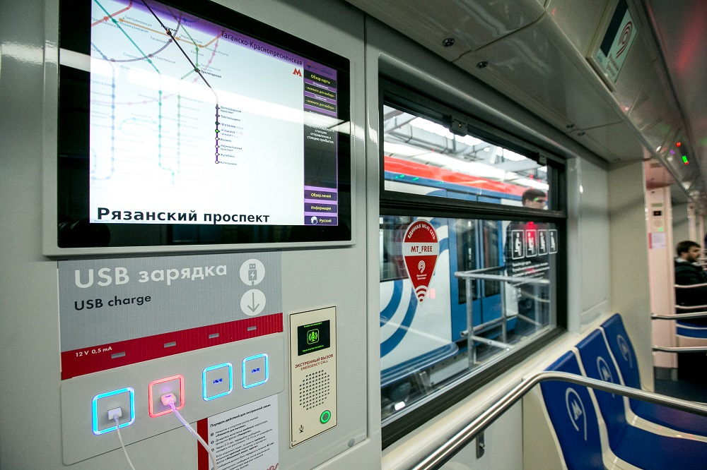 USB-зарядник и дисплей в салоне головного вагона электропоезда метро 81-765/766/767 «Москва»